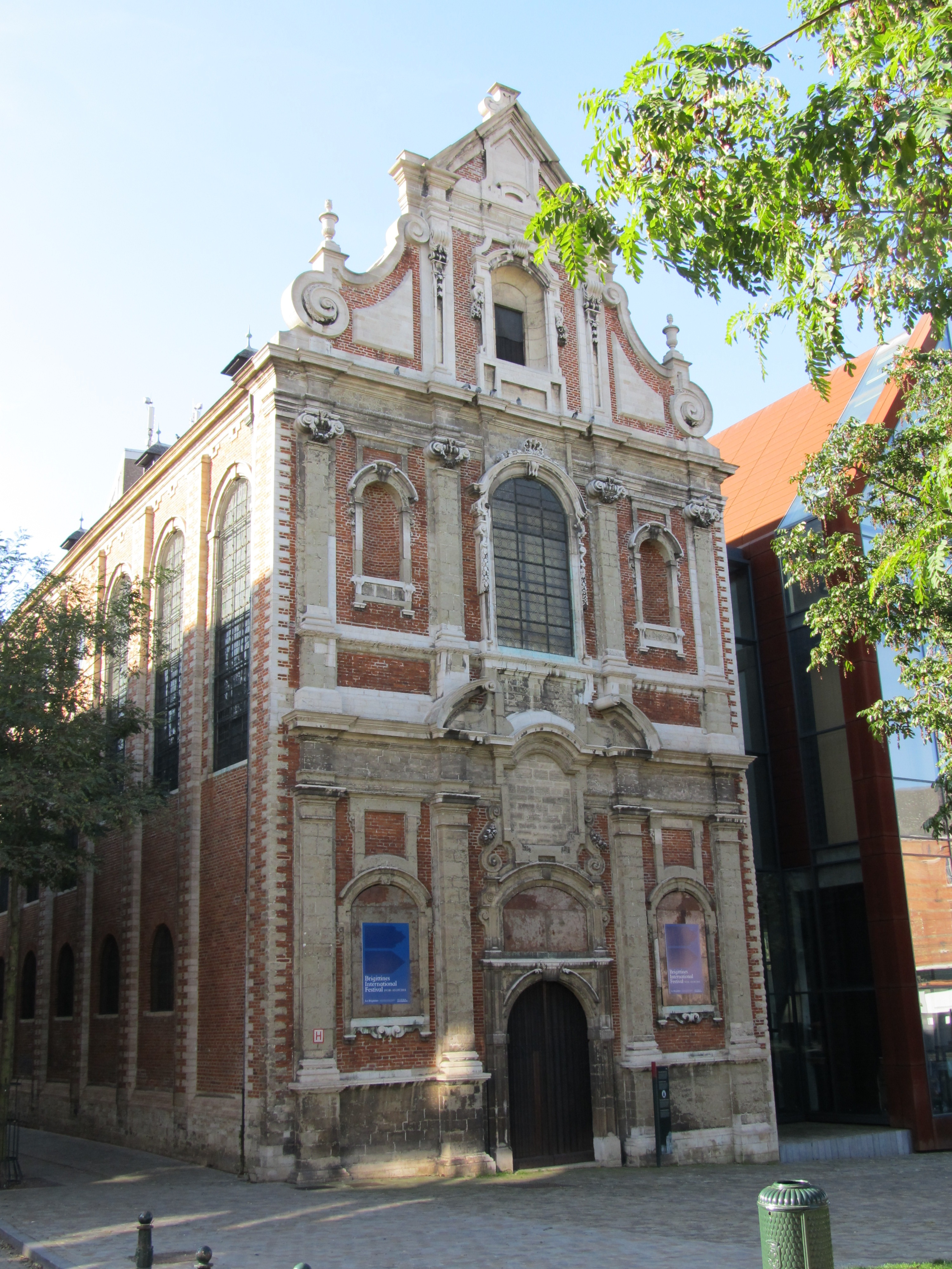 Brigittinenkerk Korte Brigitinnenstraat Brussel